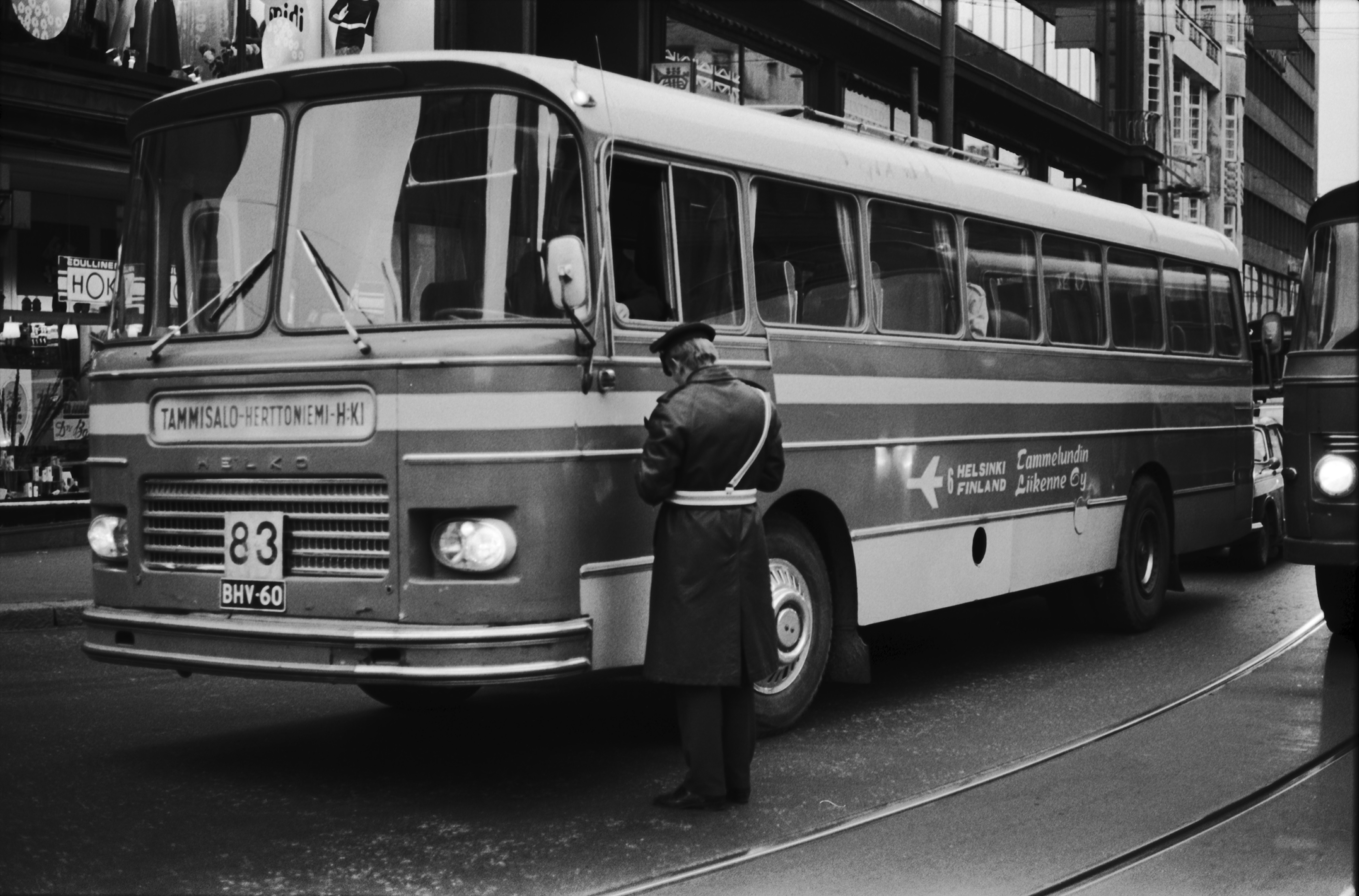 Tammelundin Liikenne Oy:n bussi 83 (Tammisalo–Herttoniemi–H:ki) Kaisaniemenkatu 6:n edessä.